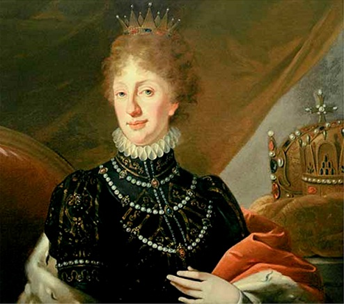 Kaiserin Maria Theresia von Neapel-Sizilien (1772-1807)